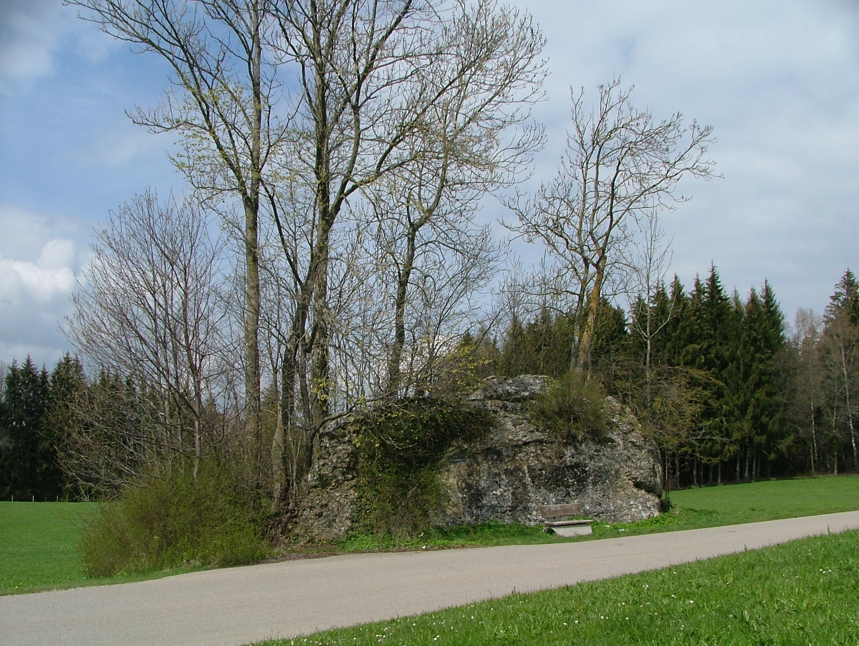 Findling